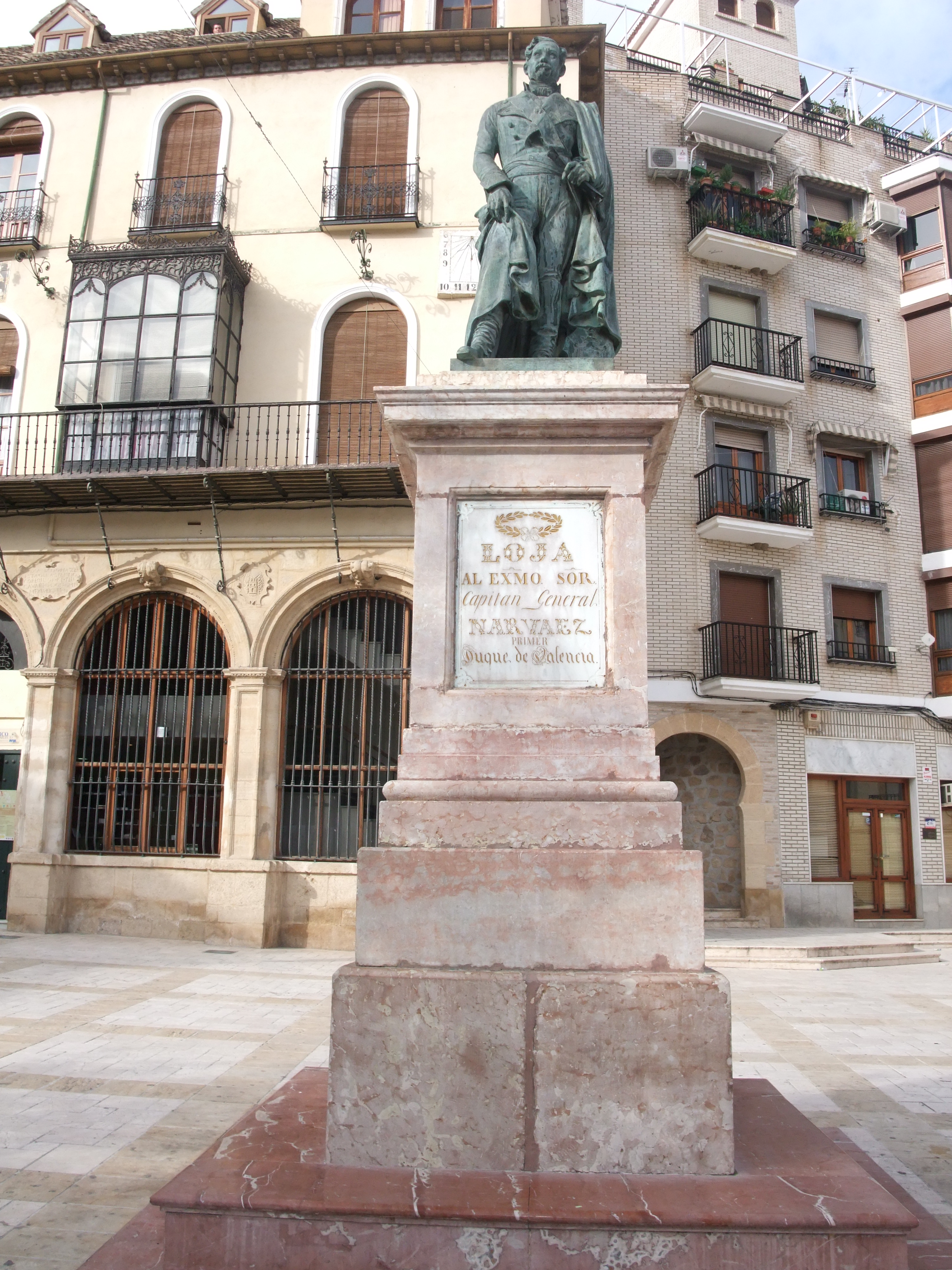 Loja (Granada)-Ramón María Narváez (presidente del Gobierno durante el reinado de Isabel II)